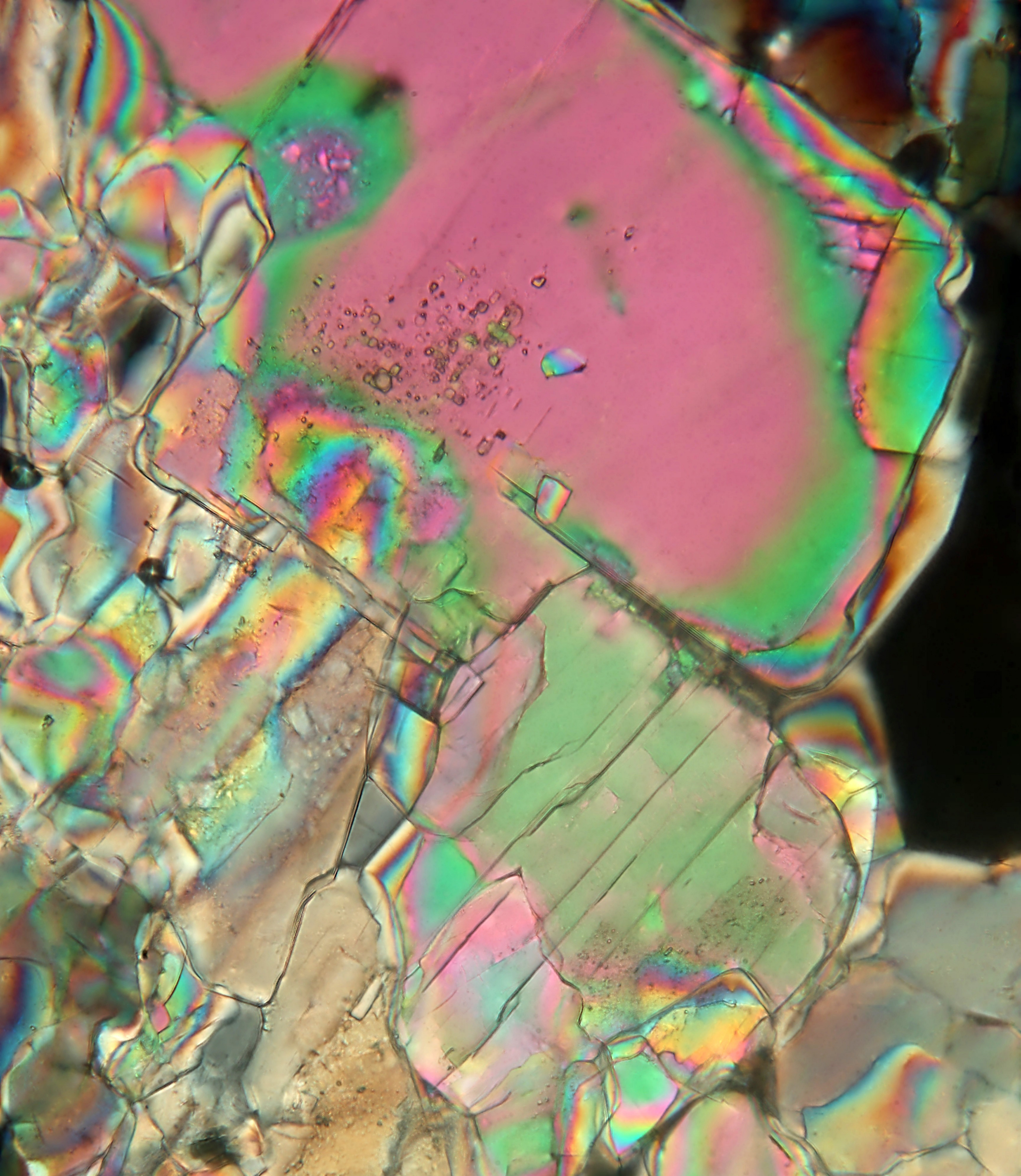 Anhydrit (Calciumsulfat) einer Anhydritlinie im Steinsalz. Durchlichtmikroskopische Untersuchung eines Gesteinsdünnschliffes. Der anisotrope Anhydrit zeigt bunte Polarisationsfarben und hat bereichsweise Einschlüsse. Canon EOS 600D-DSLR am Leitz Laborlux 12 POL-Mikroskop mit gekreuzten Polarisatoren.